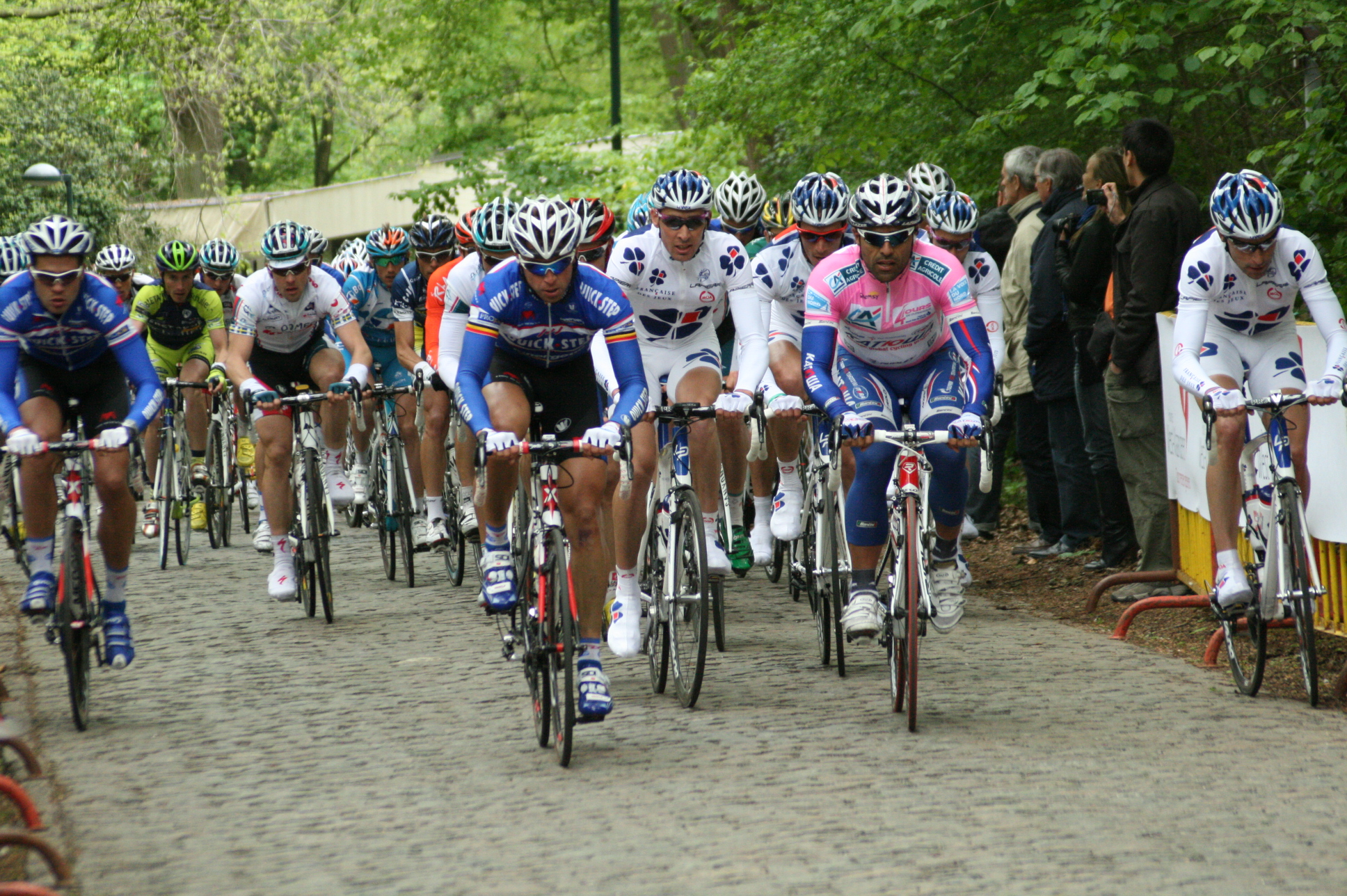 Peloton lors de la 3e étape des 4 jours de Dunkerque 2010, sur le mont Kemmel